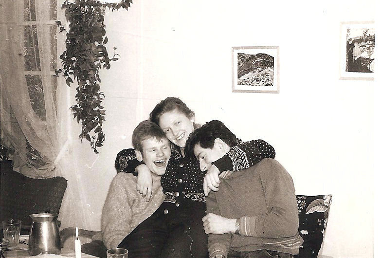 Fritz Moen (left), Solveig Askjem (center). another boy. "Hjemmet for Døve i Andebu".